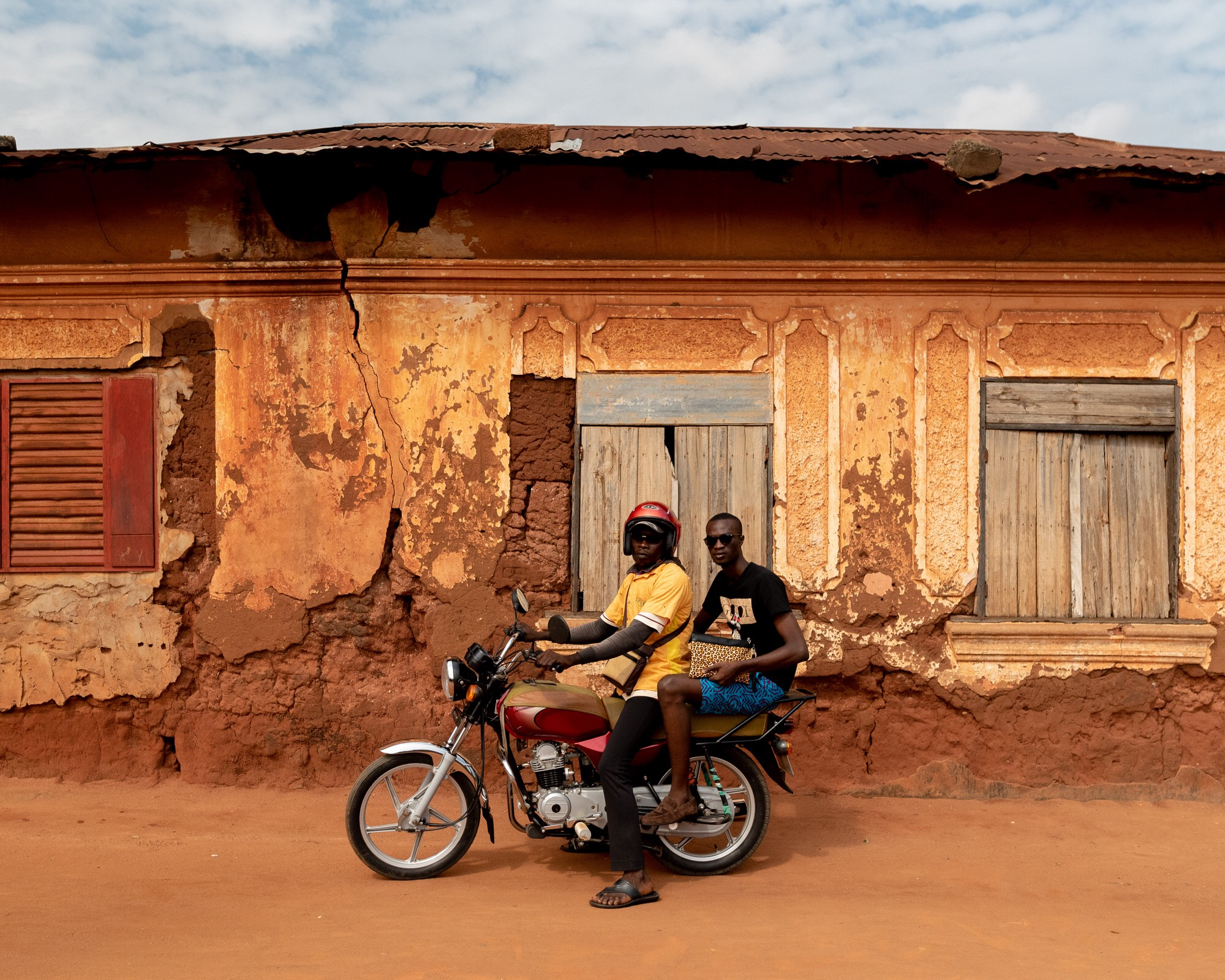 Cette image décrit un zem transportant un homme. En effet, le zémidjan est le moyen de transport ou de déplacement le plus usé au Bénin. This is an image with the theme "Africa on the Move or Transport" from: Benin